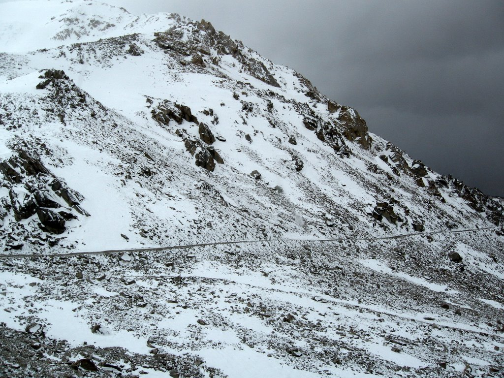 Road to Pangong Lake again